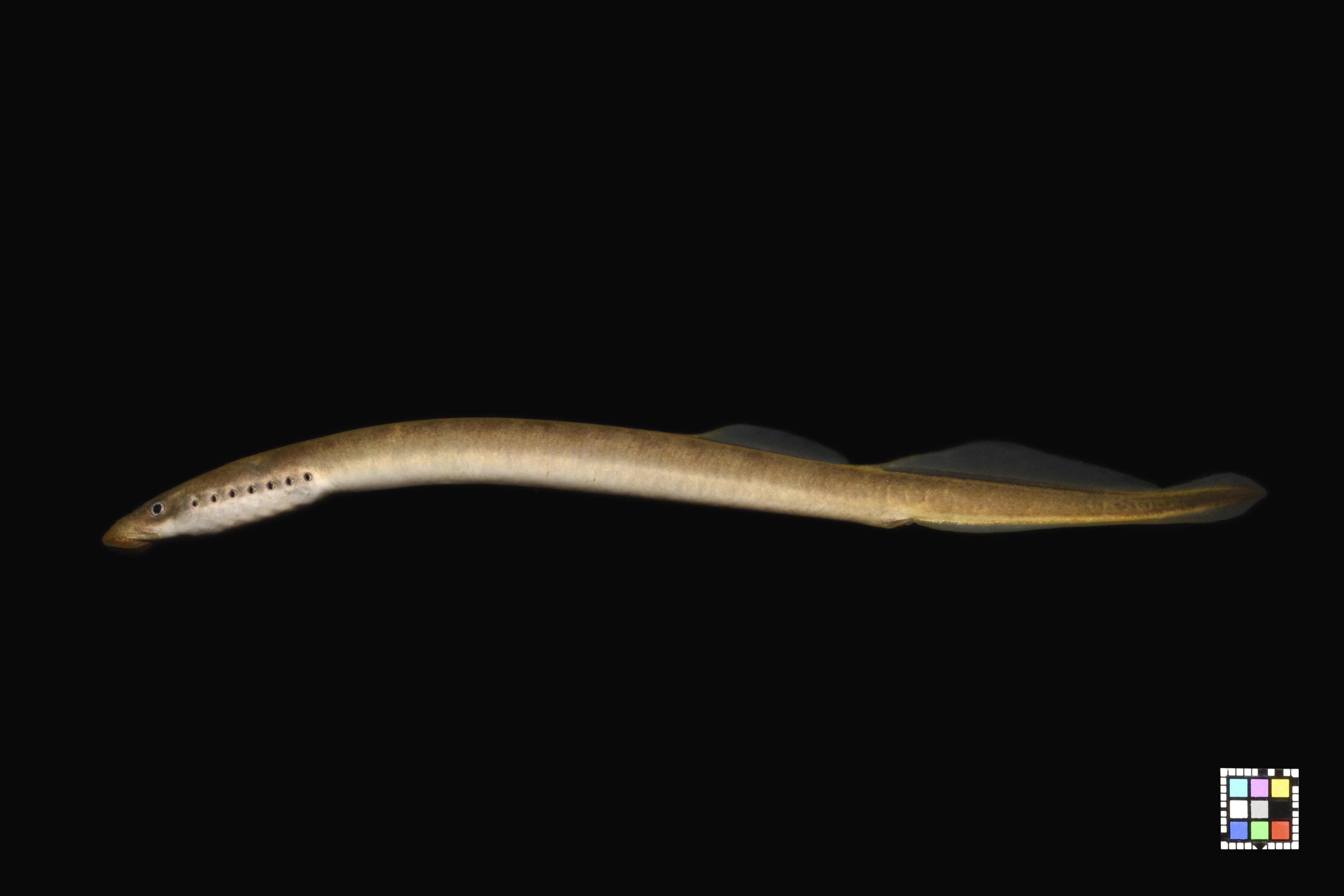 スナヤツメ（南方種）。福岡県 筑後川水系。成体。詳細